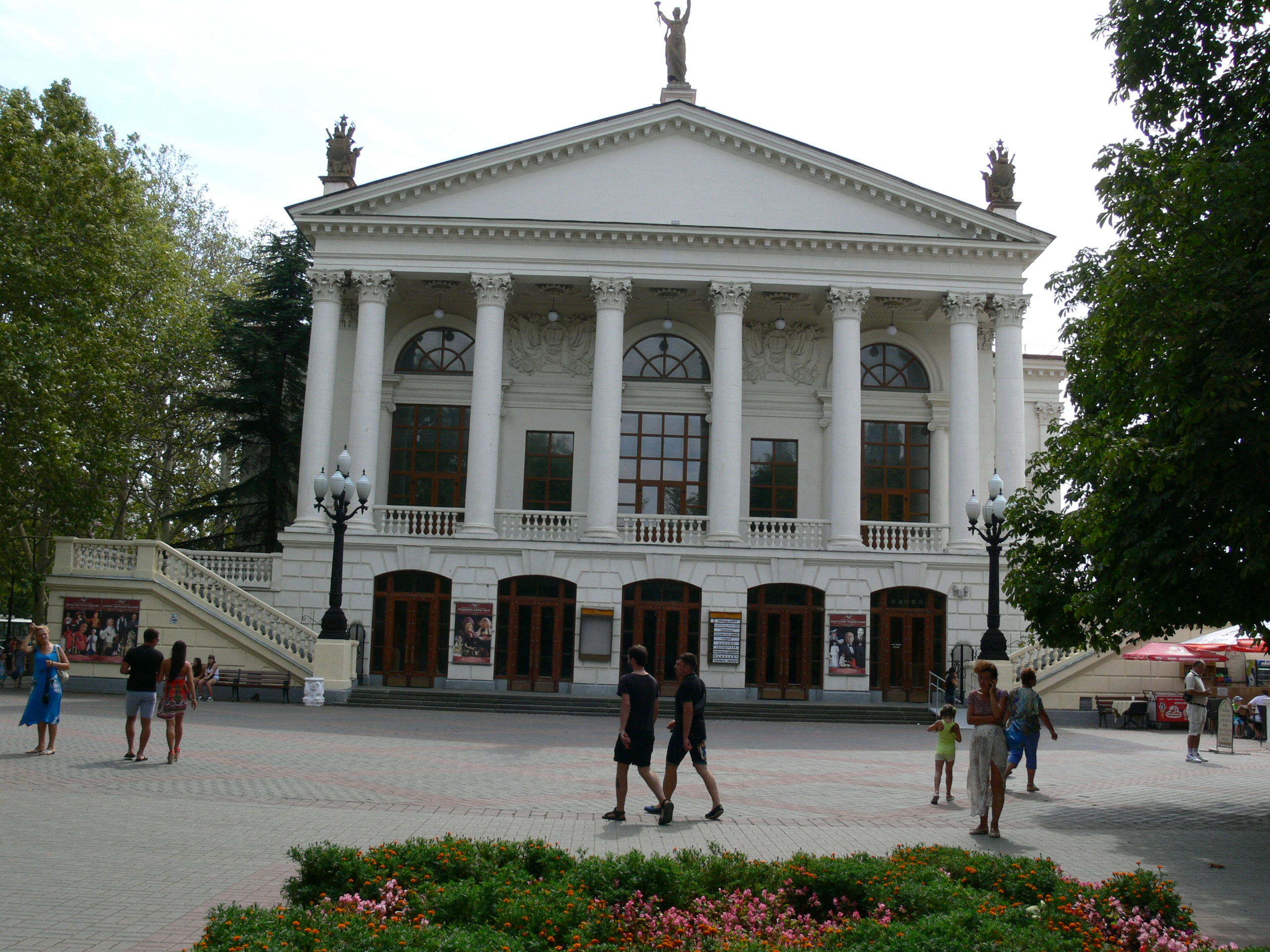 Севастопольський академічний російський драматичний театр